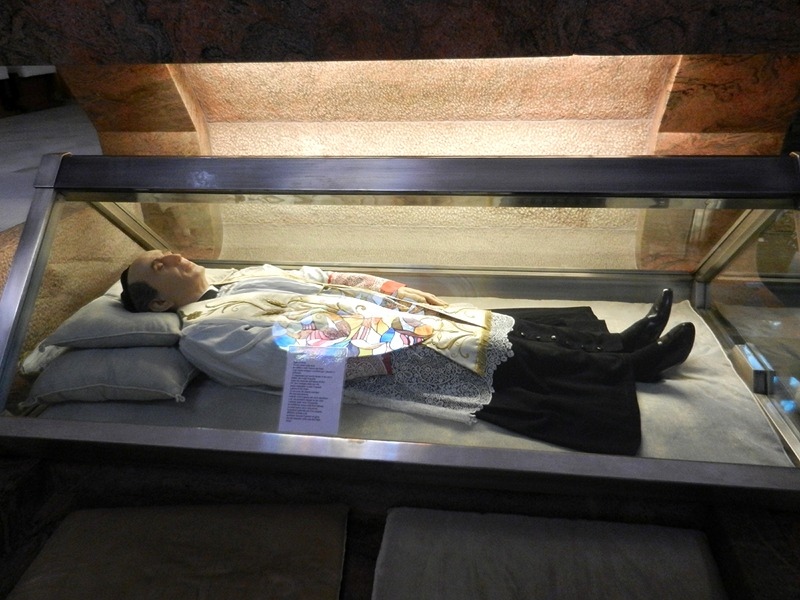 Como - Urna con le spoglie di S. Luigi Guanella all'interno del Santuario del Sacro Cuore di Gesù